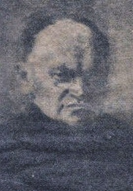 Peter Lippert (1879-1936), Ölgemälde von Leo Samberger (1861-1949)